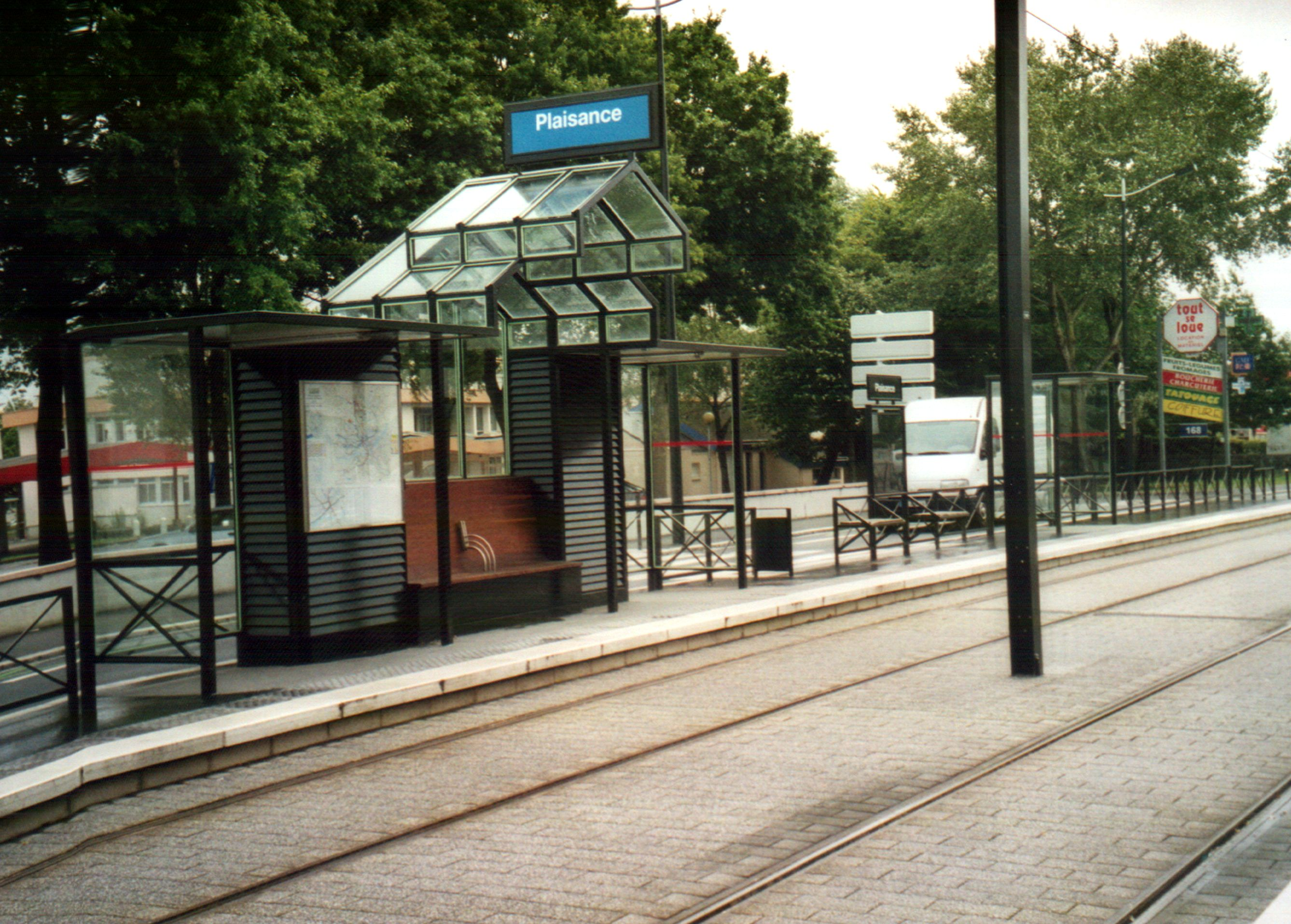 Tramway de Nantes : Station Plaisance (ligne 3) en 2001